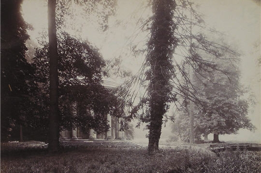 Le Paris de la Belle Epoque - Versailles Temple d'Amour